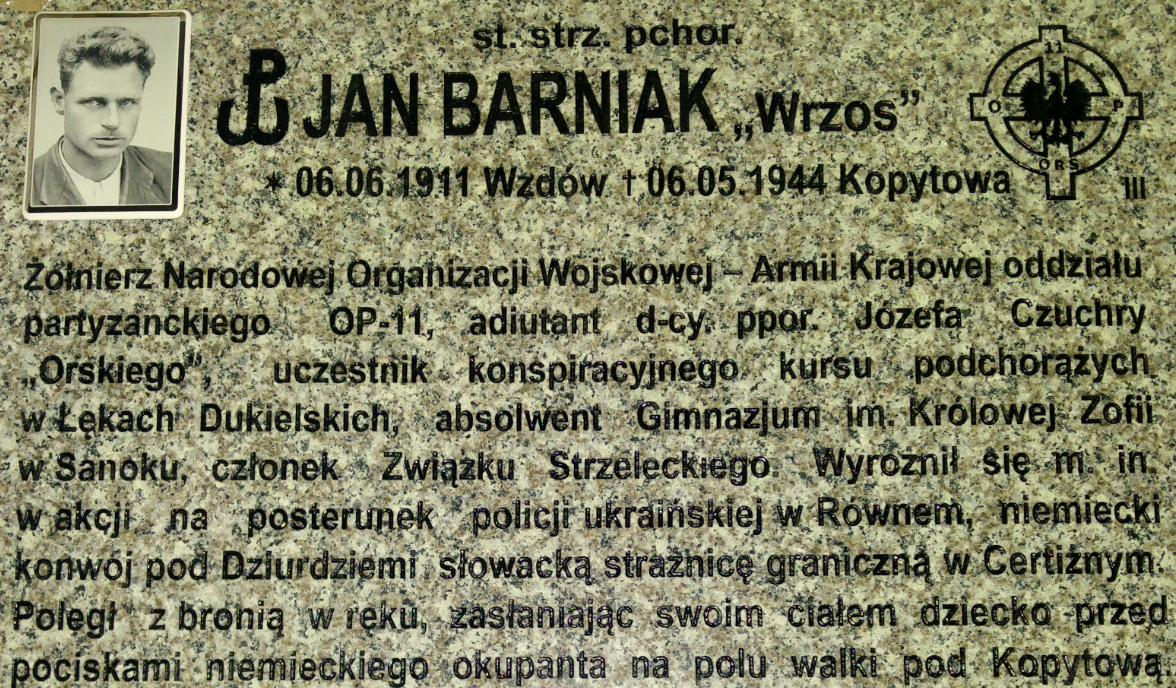 Jan Barniak "Wrzos" fragment tablicy nagrobnej. Cmentarz w Jasionowie